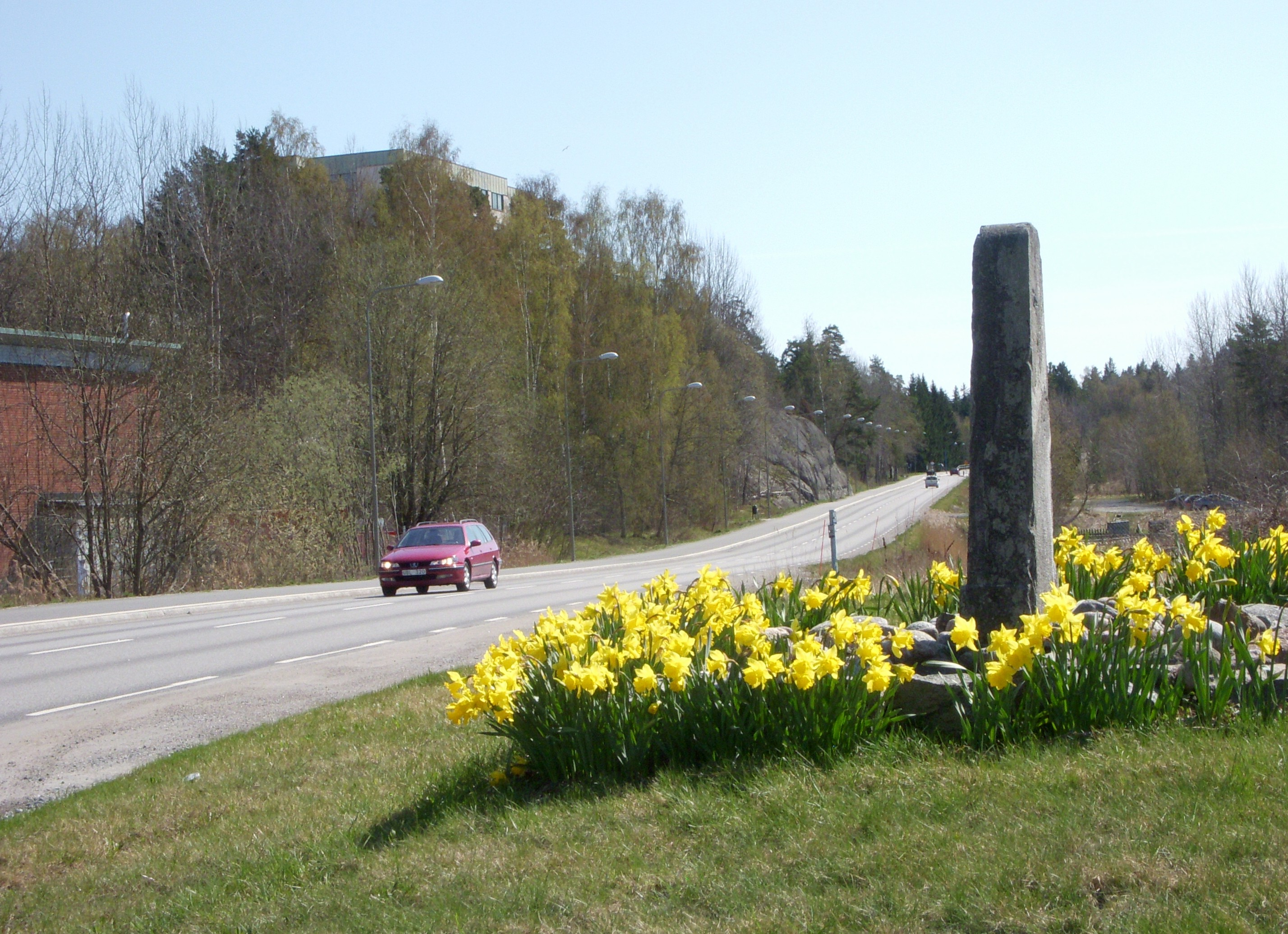 Gamla Nynäsvägen vid Lyckåsen (Skogås)